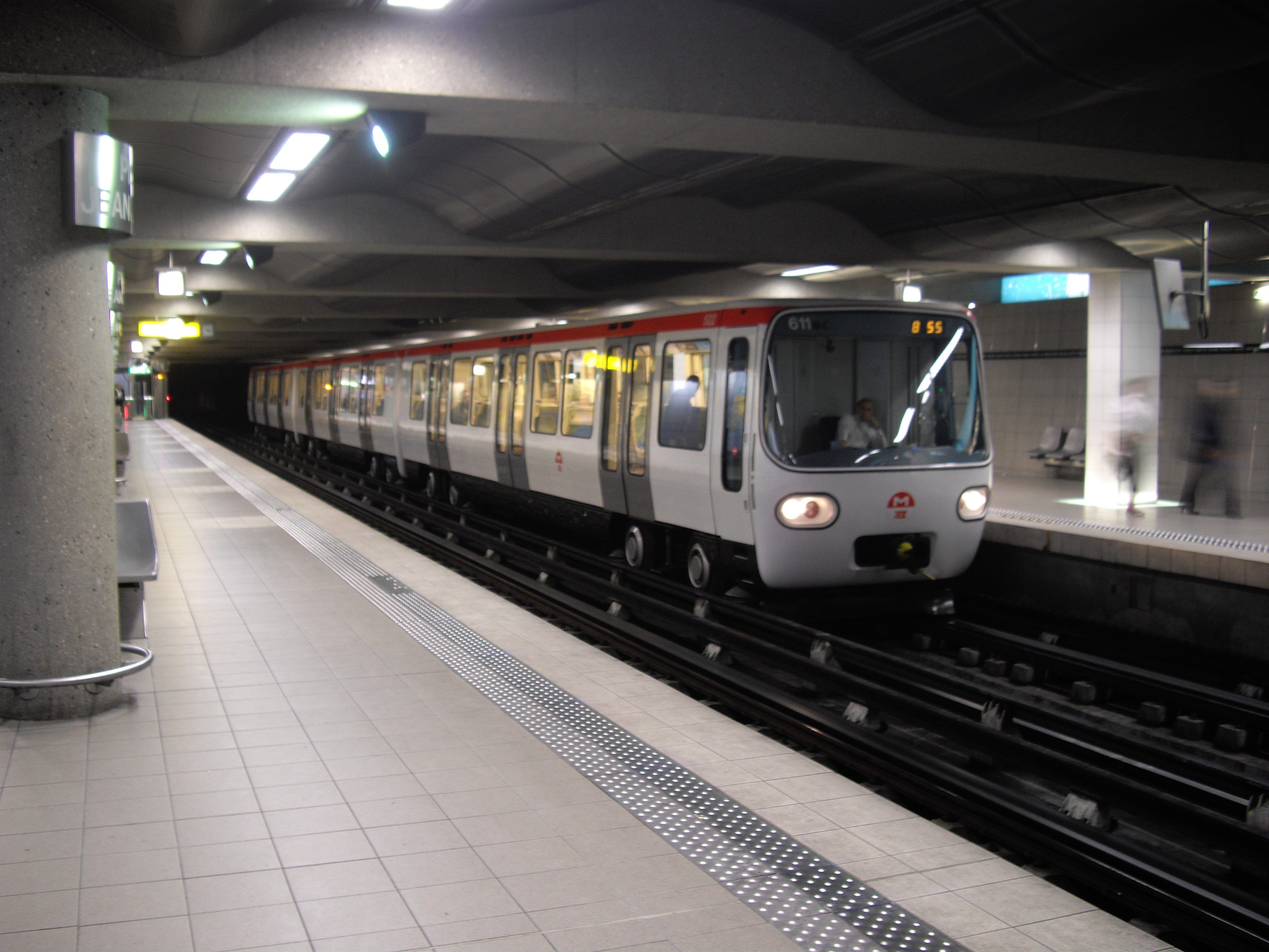 MPL75 de la ligne B du métro lyonnais, à la station Place Jean Jaurès, en direction de Charpennes Charles Hernu.